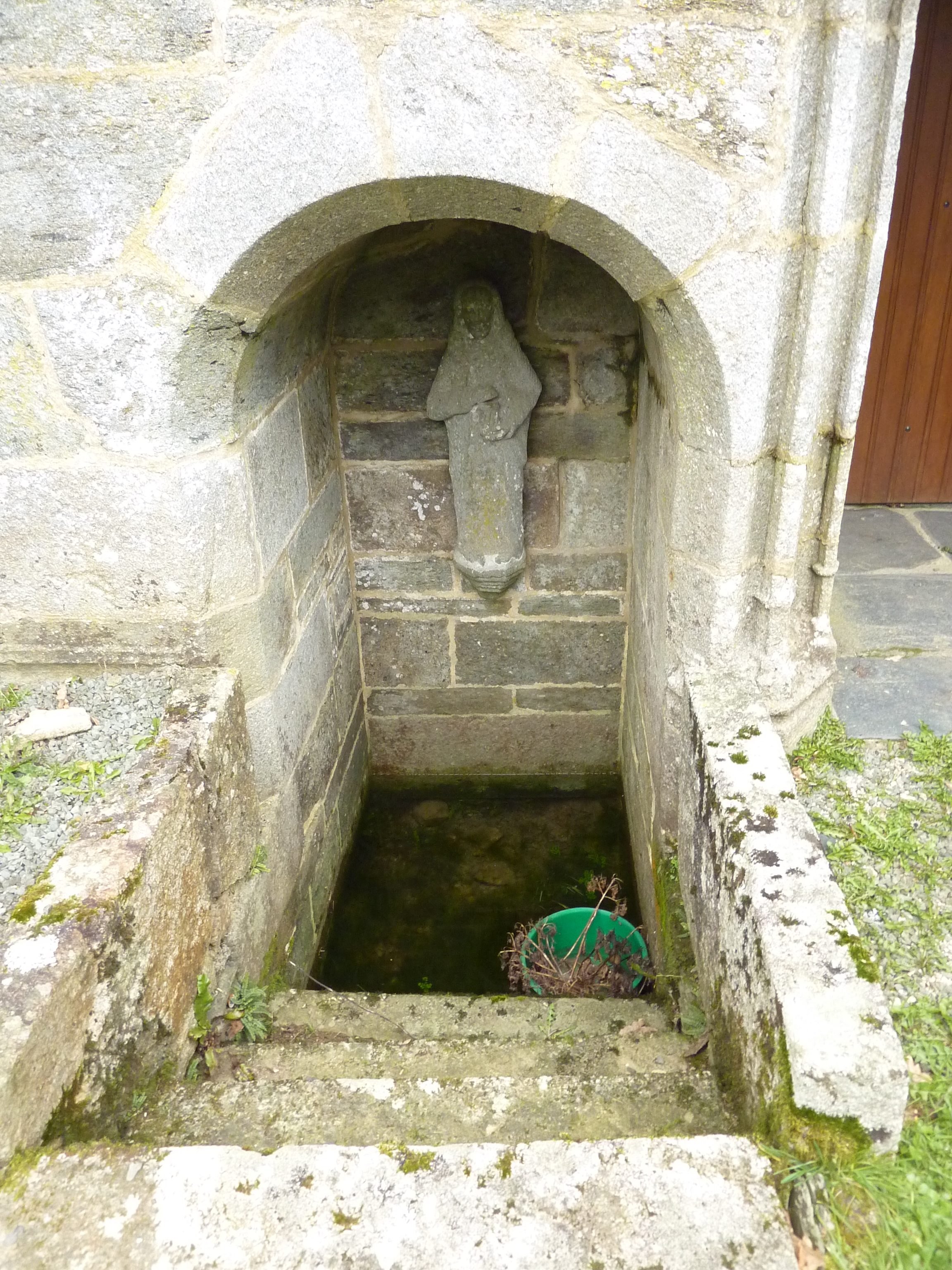 Pleyben : chapelle de la Madeleine ; la fontaine encastrée dans la façade